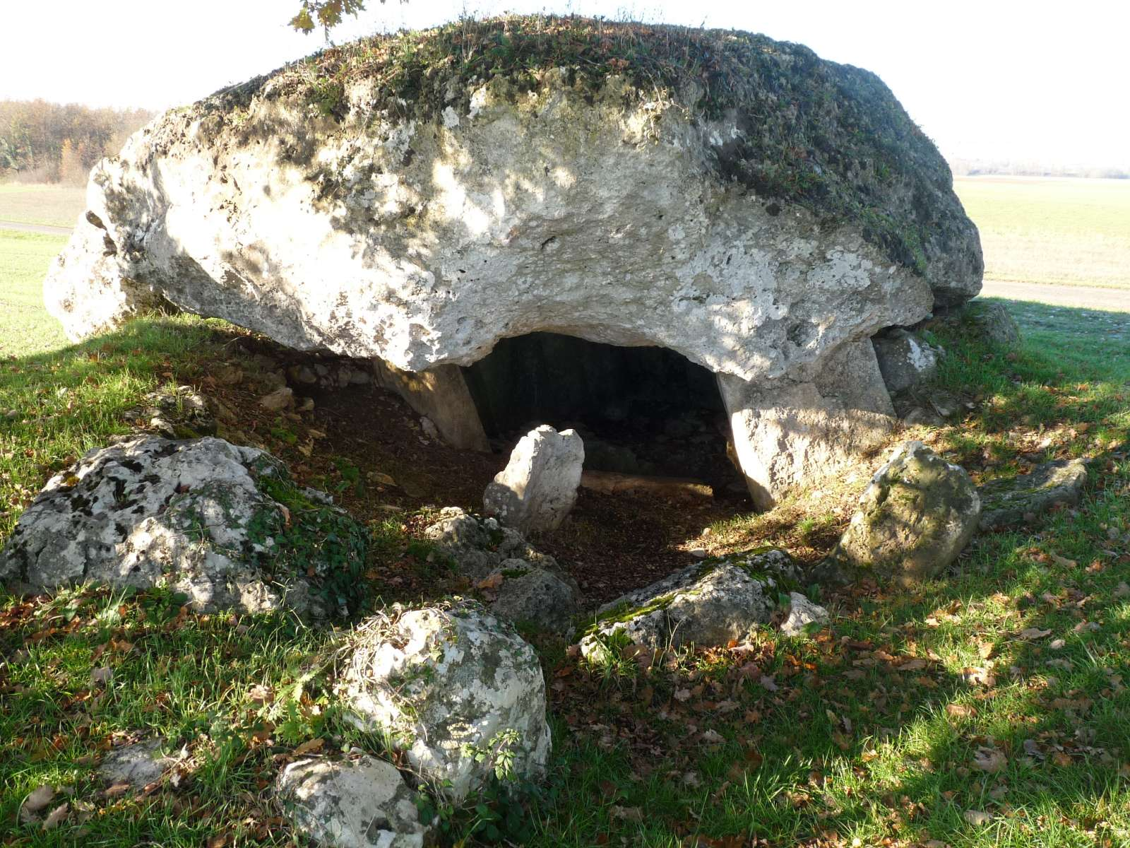 dolmen de la Grande Pérotte, Fontenille, Charente, France